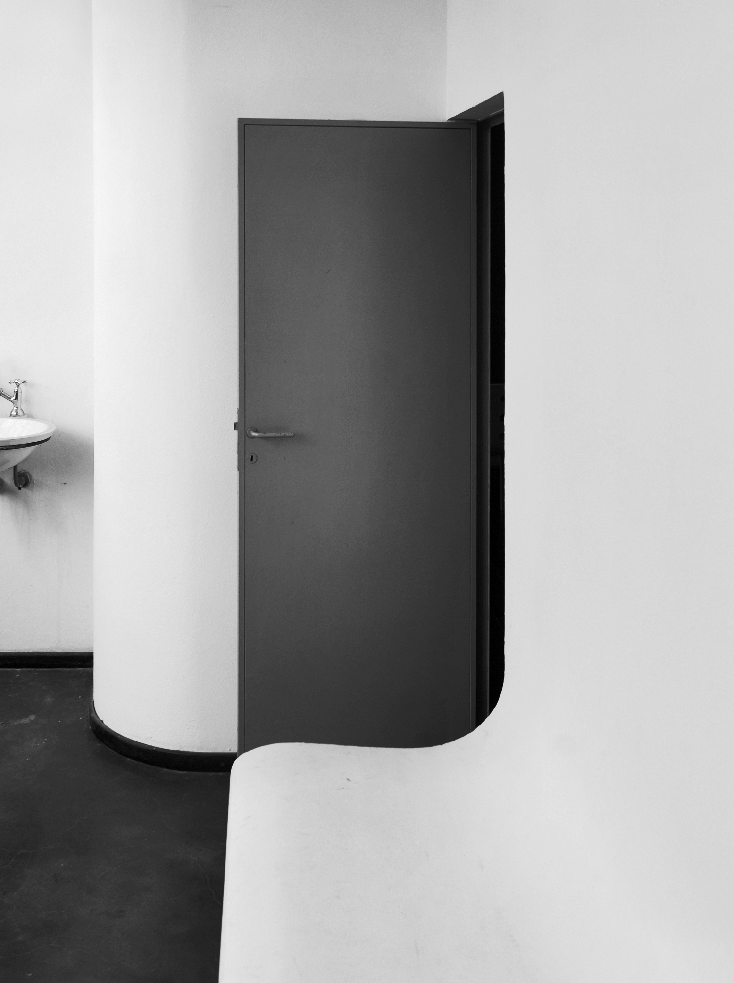 1977 reconstruction of Le Corbusier's Pavillon de l'Esprit Nouveau in Bologna, Italy